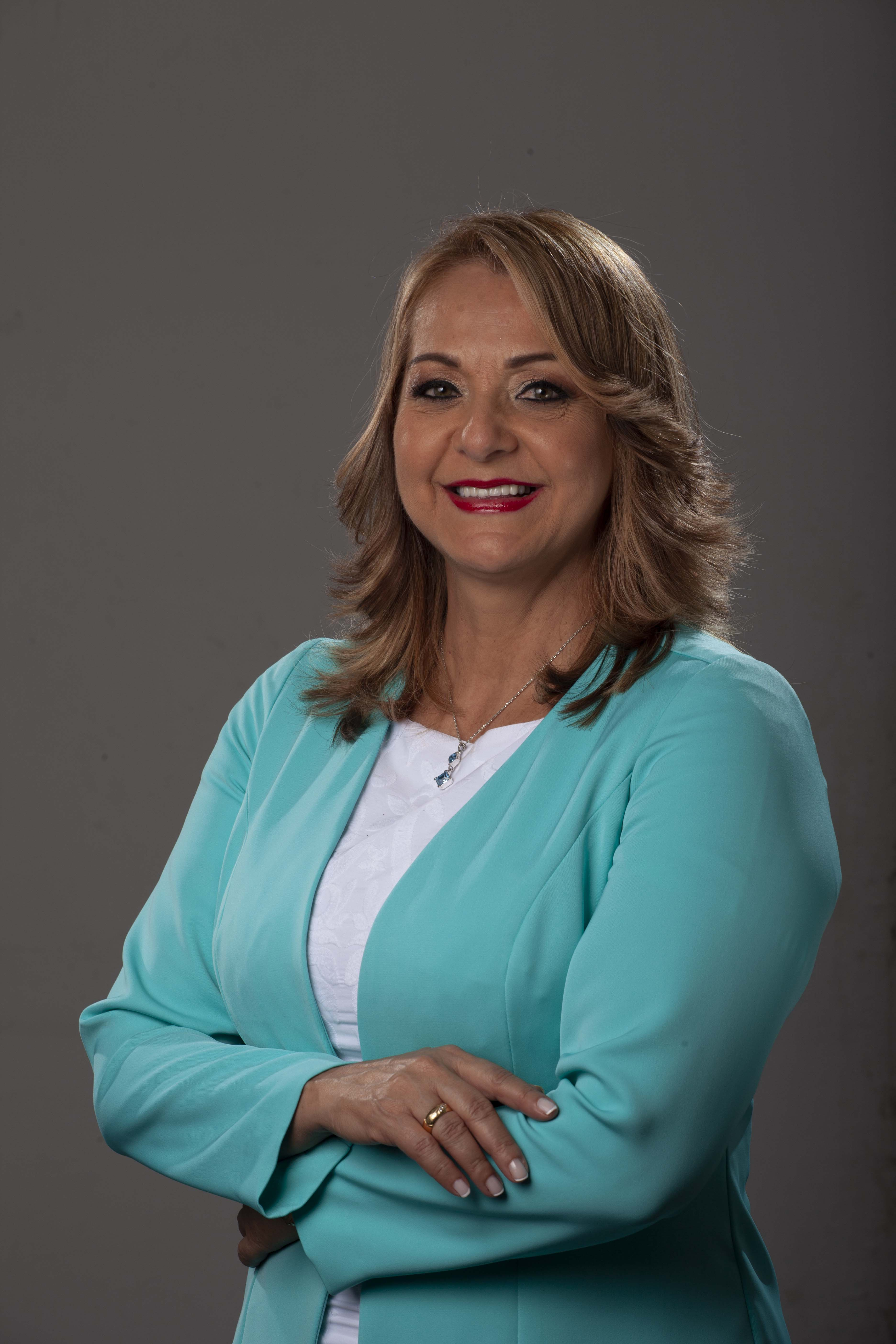 Aydeé Lizarazo Cubillos, senadora de la República 2018-2022.